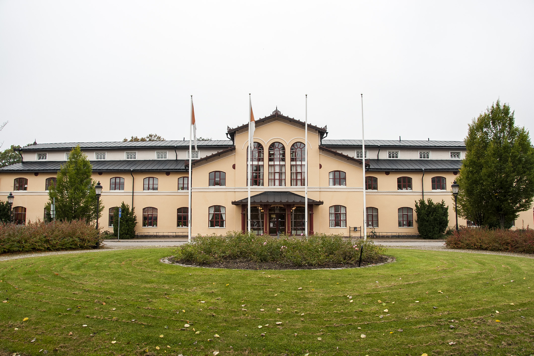 Expositionshuset, Karlstad. Byggnadsår 1862. Arkitekt Adolf Wilhelm Edelsvärd